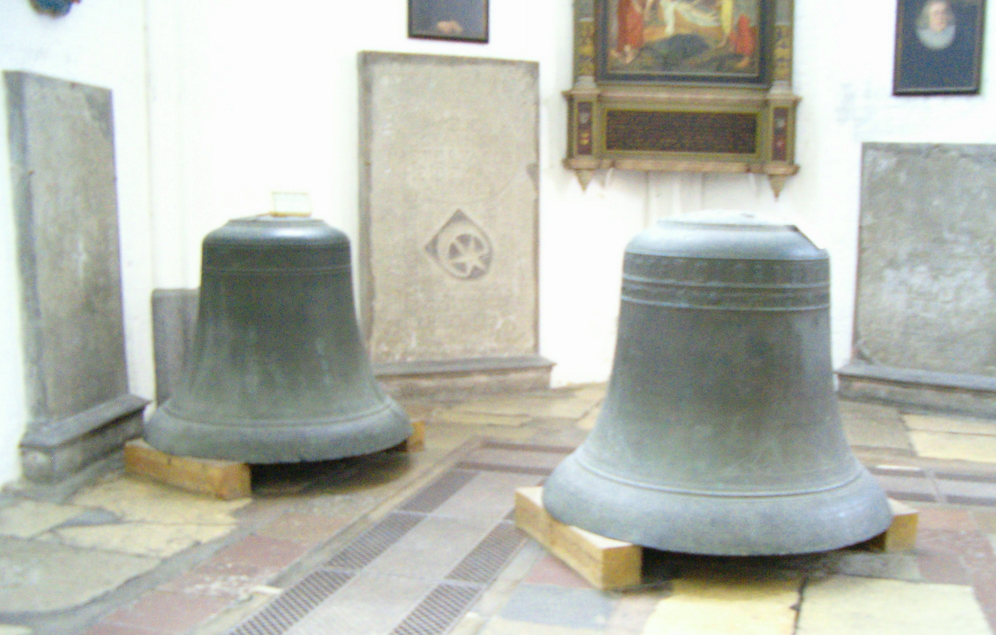 Rostock, St. Marien: Bürgerglocke, um 1300, Schlagton c1, Ø 1705 mm, 3147 kg und Große Glocke, Rickert de Monkehagen, 1409, Schlagton d1, Ø 1775 mm, 4226 kg. Abgestellt in der Kirche (vor der Sanierung).